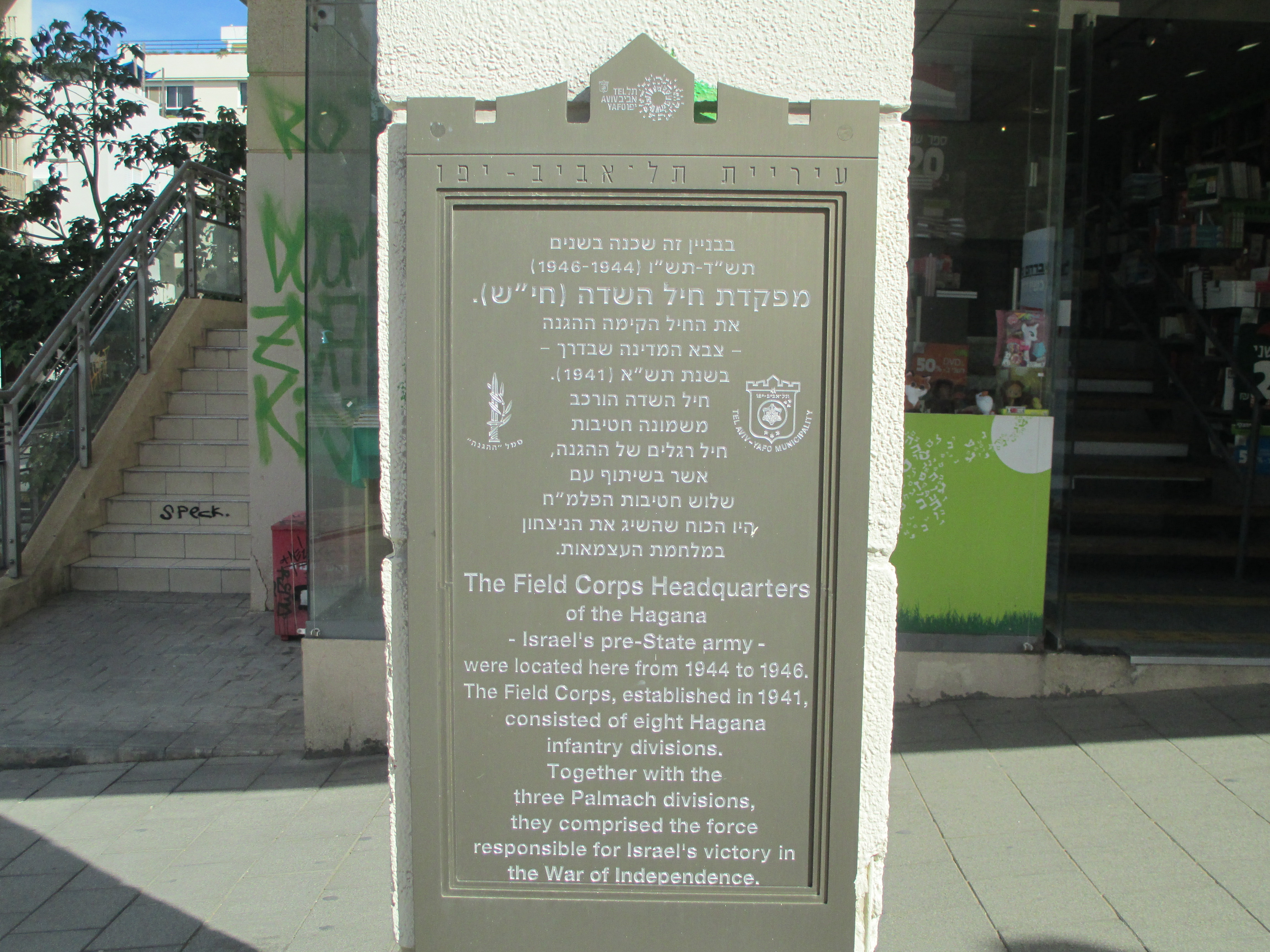 לוחית זיכרון במקום בו היה מטה החי"ש בתל אביב ברחוב שינקין 45